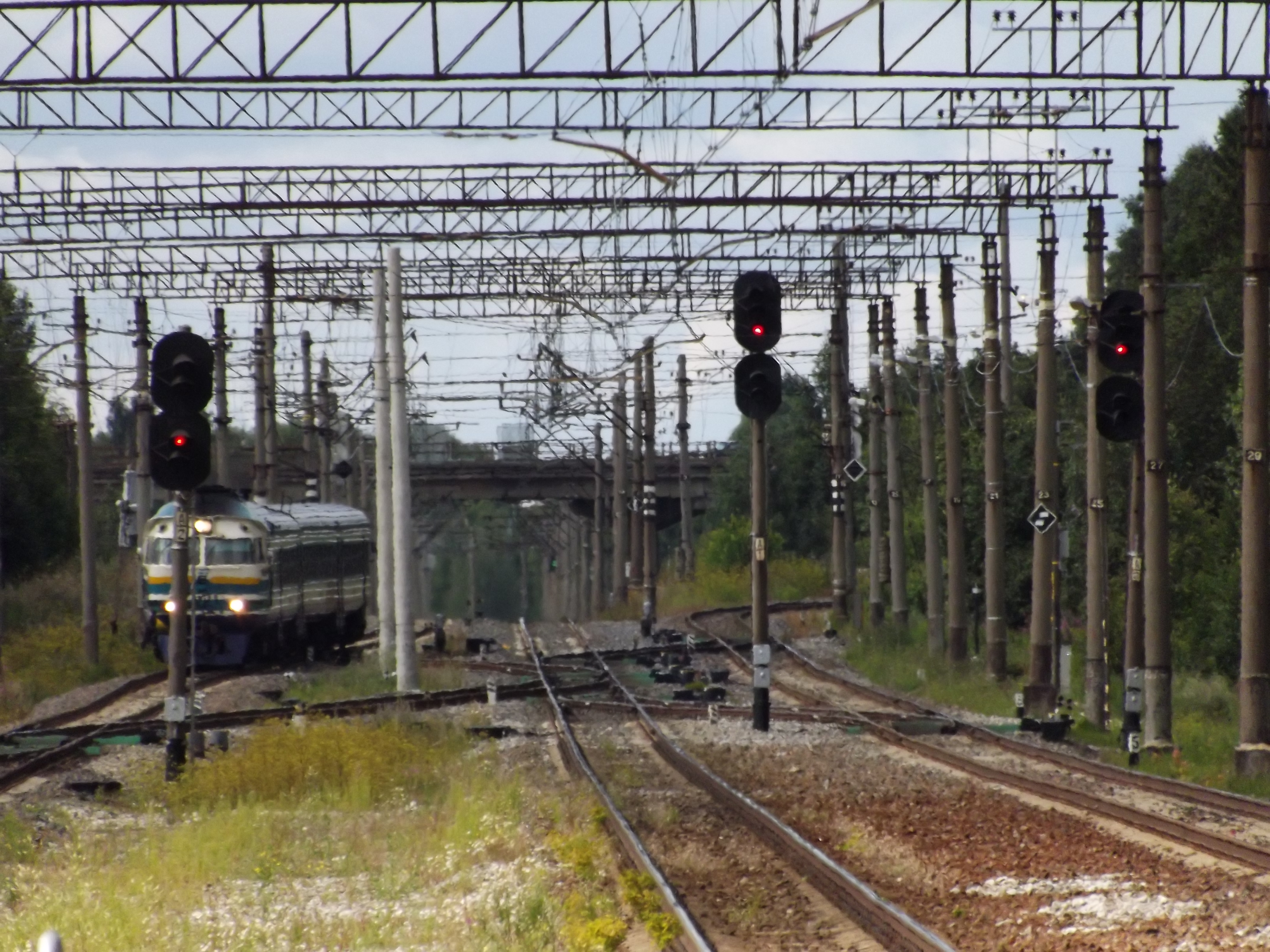 Lagedi raudteejaam vaatega Tallinna suunas, taamal Edelaraudtee reisirong DR1B